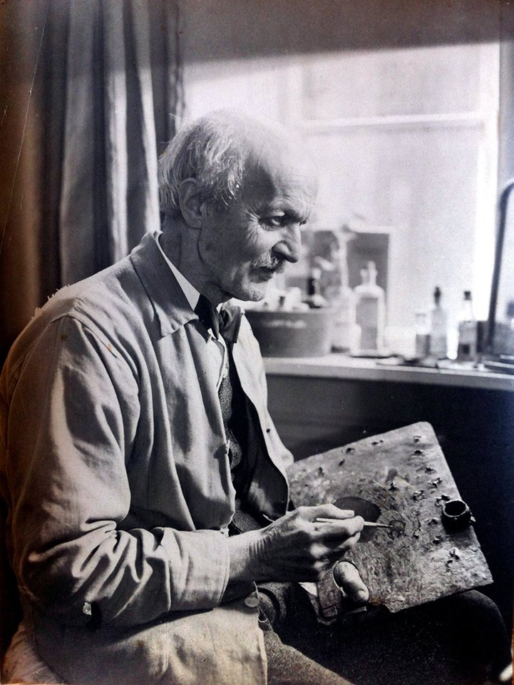 Fotografisk portræt af Christian Bang, u.å, fotograf ukendt. Familiearkivet.